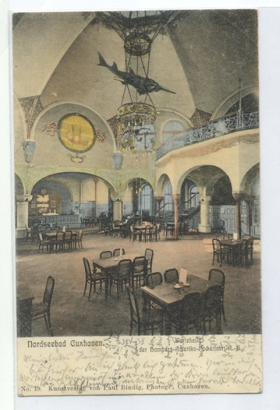 Wartesaal der Hamburg-Amerika-Linie in Cuxhaven